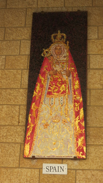 Church of the Annunciation, Nazareth, Israel Basilica of the Annunciation